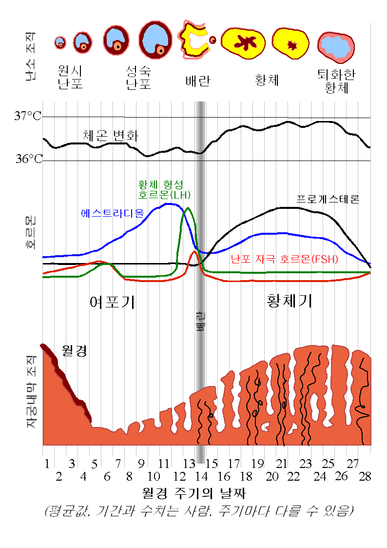 월경 주기에 따른 주요 호르몬 변화와, 기초 체온, 자궁 내벽의 두께 등을 알아볼 수 있는 도표. 원본은 Image:MenstrualCycle2.sxd